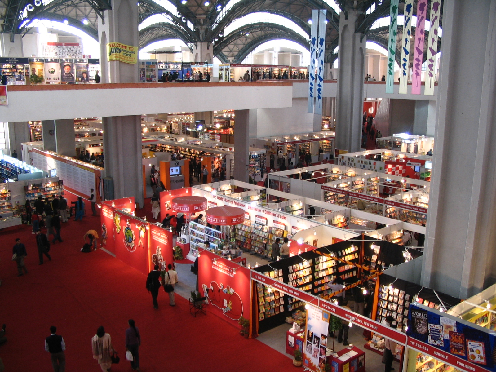 Hall no 18 in Pragati Maidan, New Delhi, India